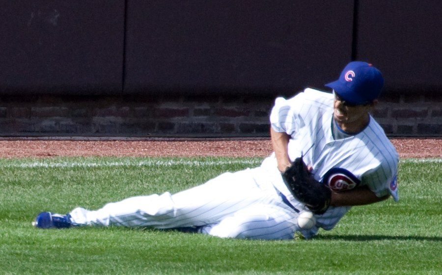 So Taguchi